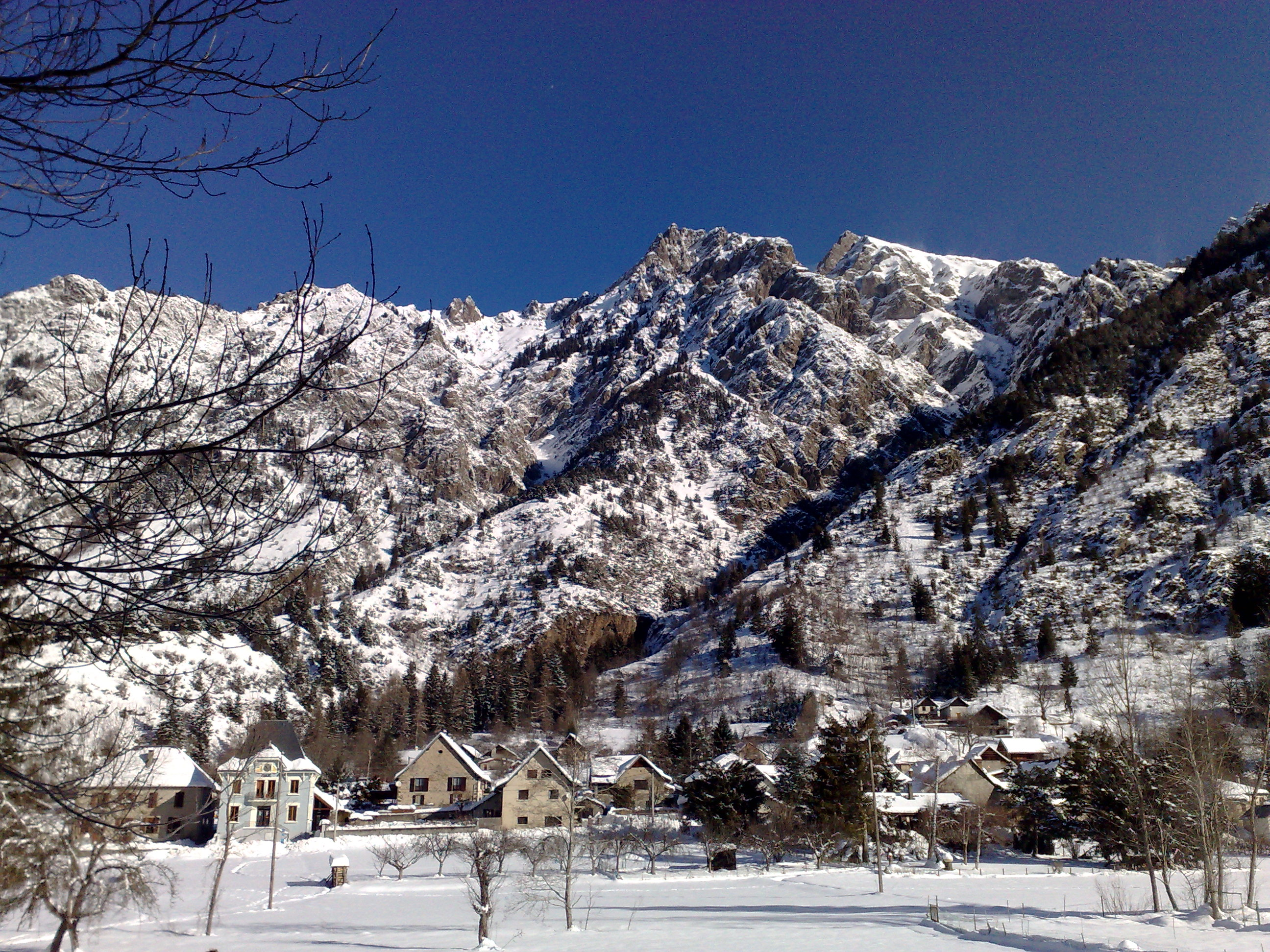 La Chalp en Valjouffrey en hiver (Mairie) (janvier 2010)